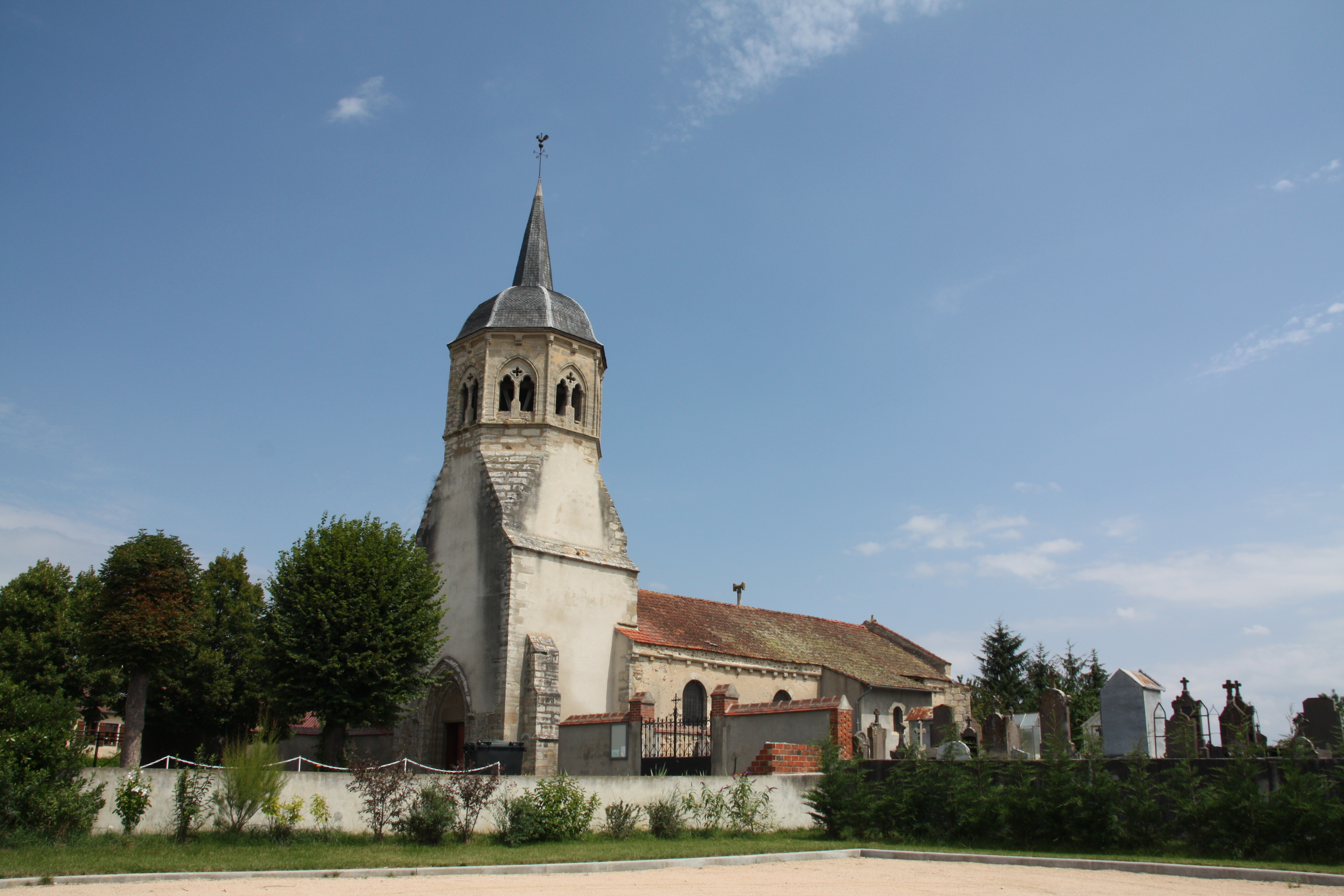 Église de Monestier, Allier, France